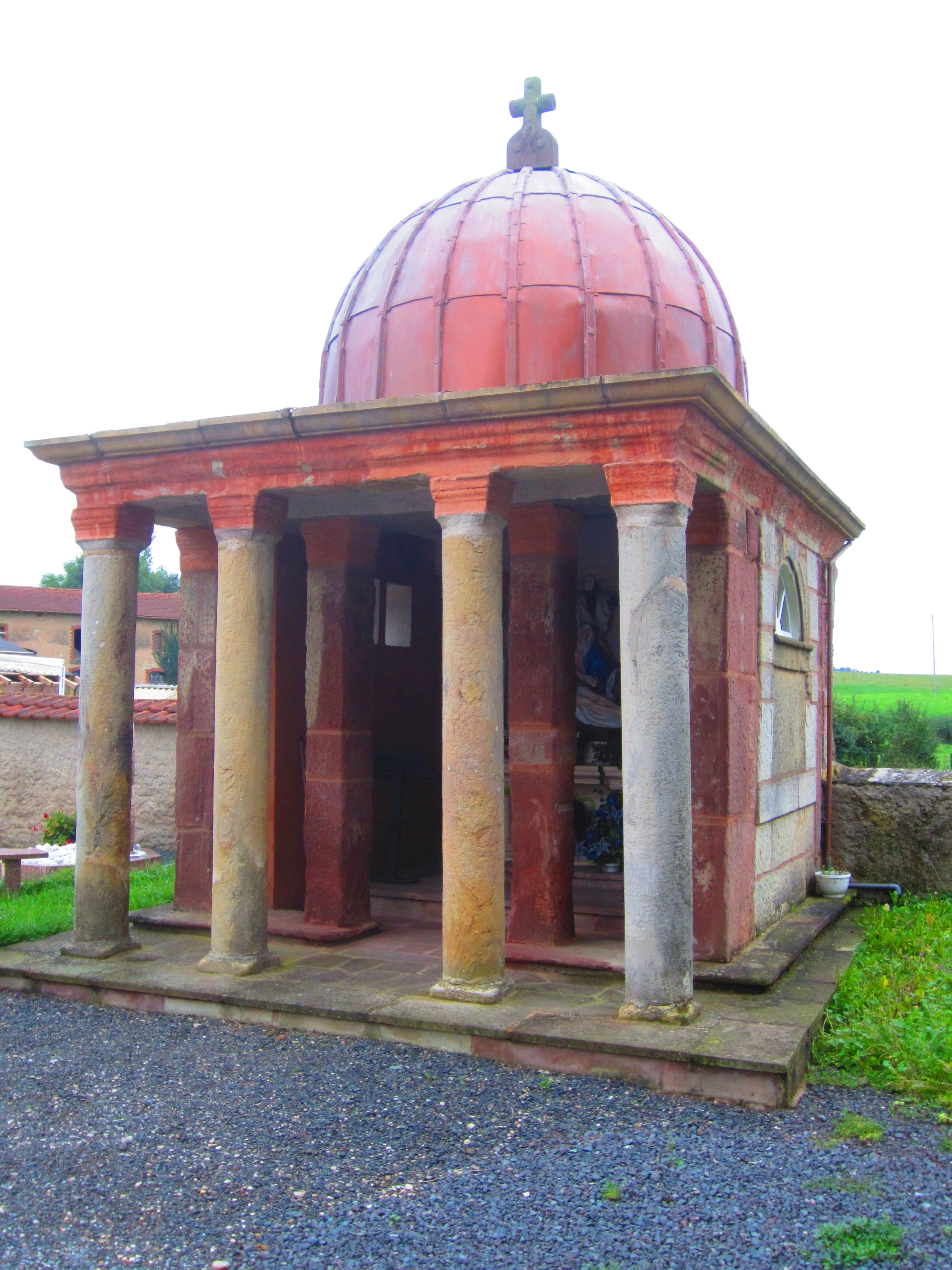 Chapelle cimetiere Bourdonnay